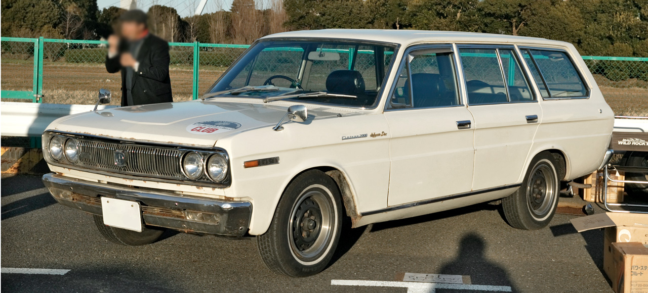 Nissan Cedric Van 2000 De Luxe 6 ( VH130 )